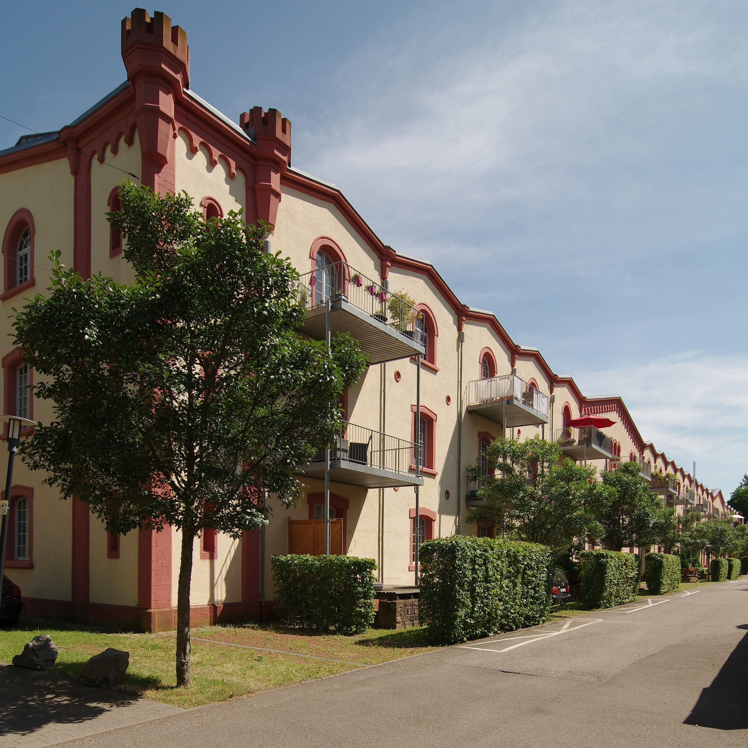 Ehemaliges Proviantmagazin oder Körnermagazin der Festung Rastatt, zu Wohnungen umgebaut.